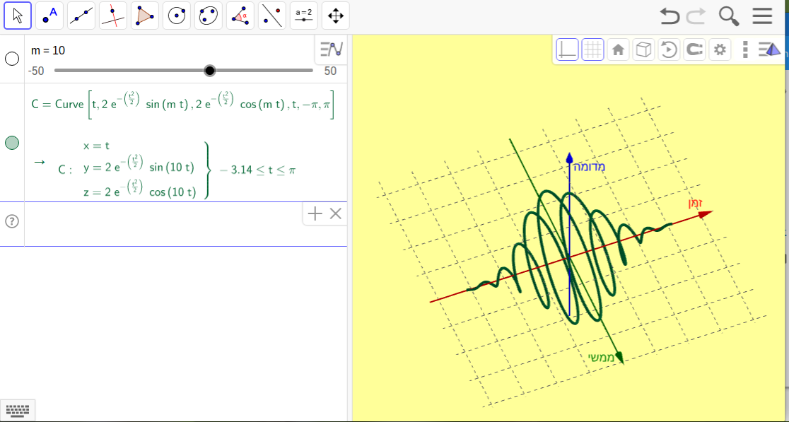 הצגה בתכנת גאוגברה בתלת ממד של פונקציה מהזמן למרוכבים